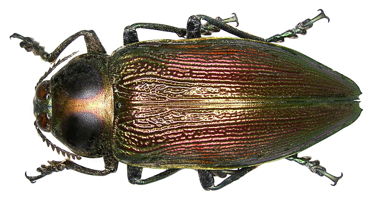 Familie: Buprestidae Grösse: 55 mm Verbreitung: Südamerika Fundort: Peru, Dep. Amazonas, Bagua Chica leg. 1999; det. U.Schmidt Foto: U.Schmidt, 2005